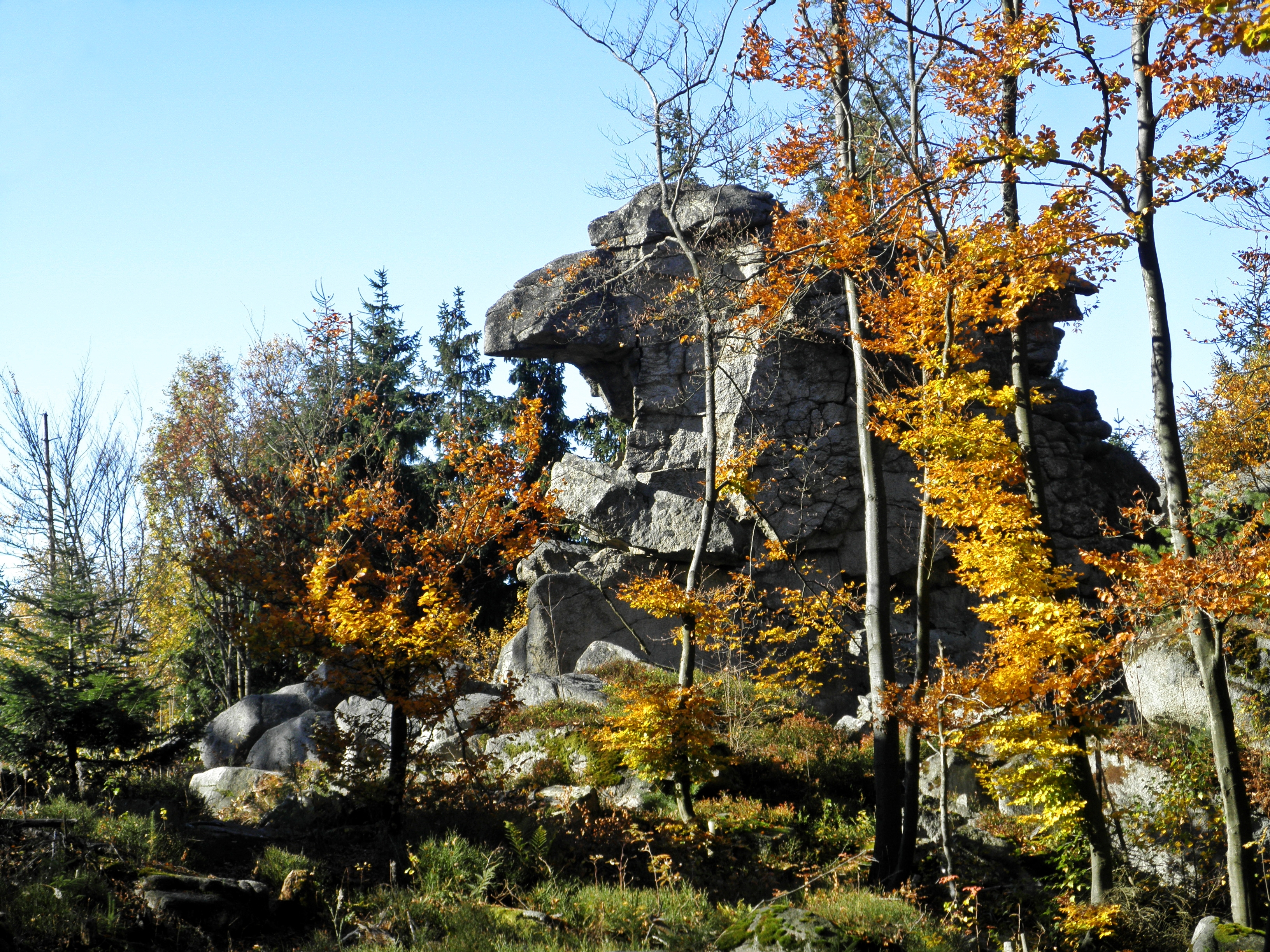 Zipfeltannenfelsen oder Steinwald-Sphynx